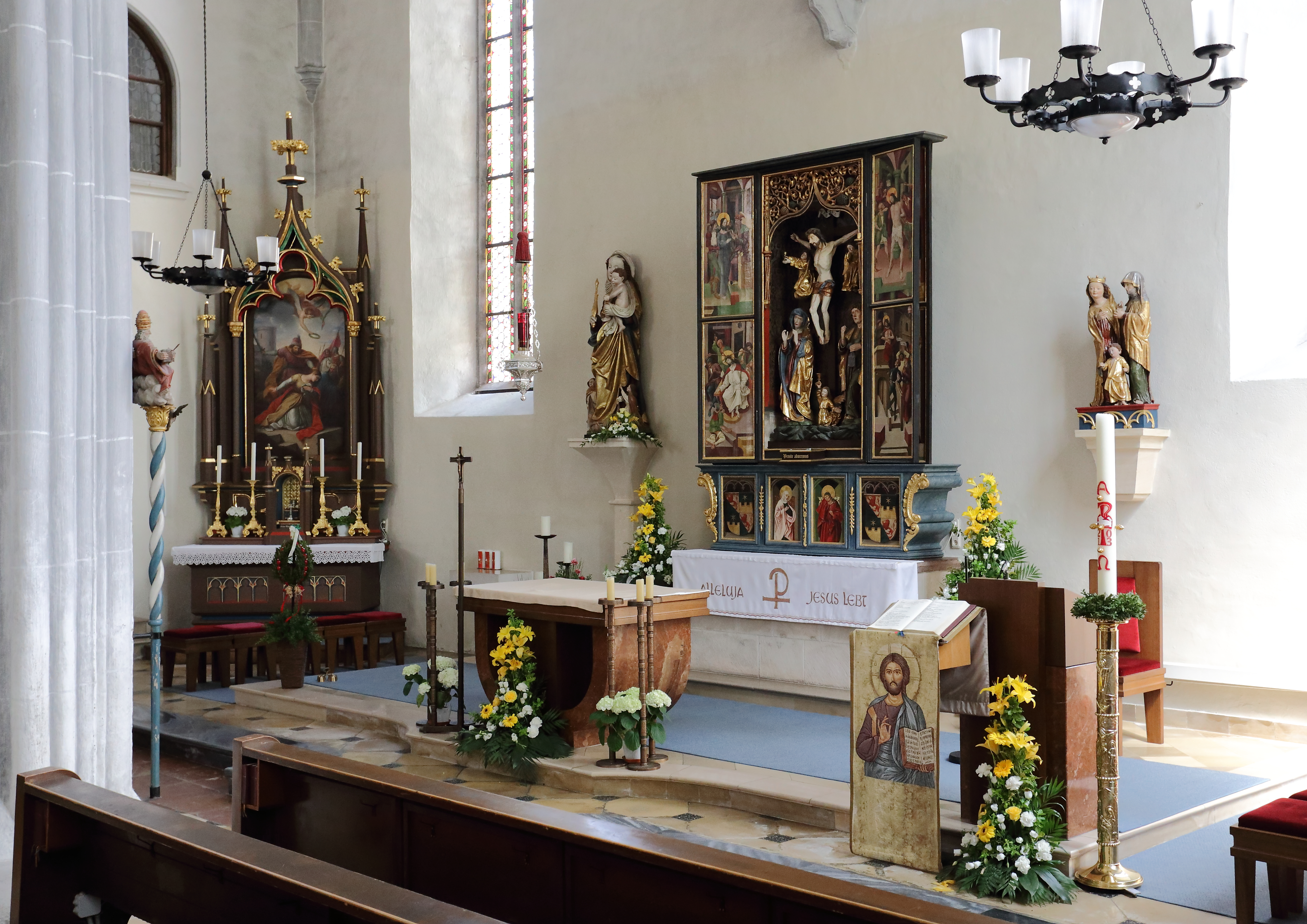 Altarraum der katholischen Pfarrkirche hl. Anna in der niederösterreichischen Marktgemeinde Pöggstall.